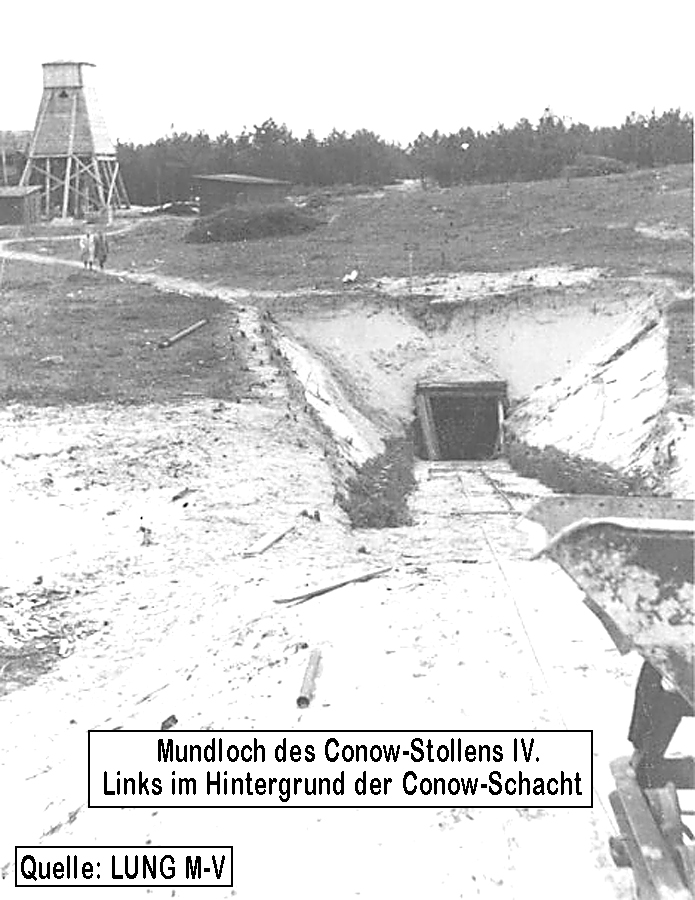 Mundloch des Conow-Stollens IV